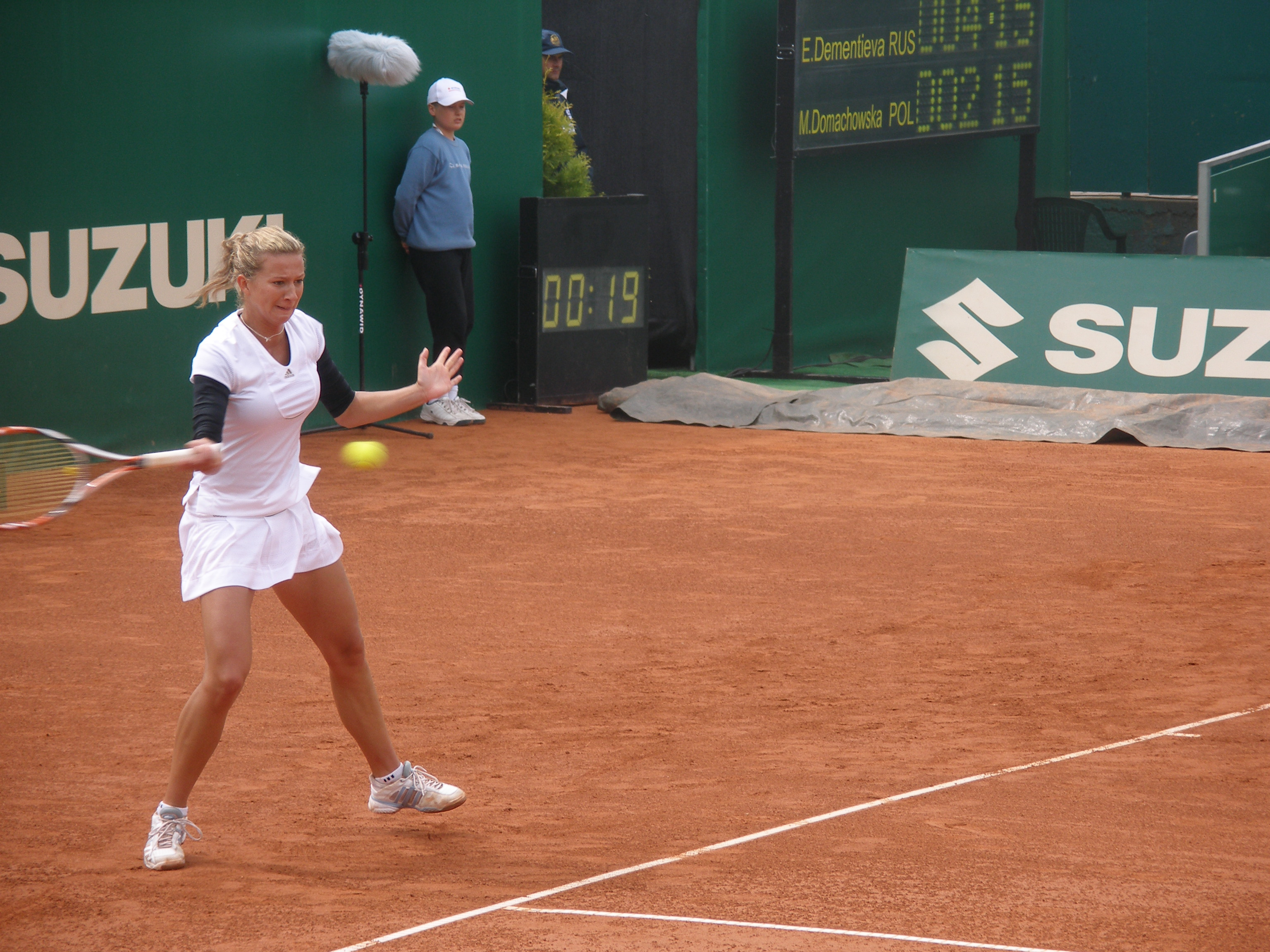 Marta domachowska podczas meczu z Jeleną Dementiewą, Suzuki Warsaw Masters